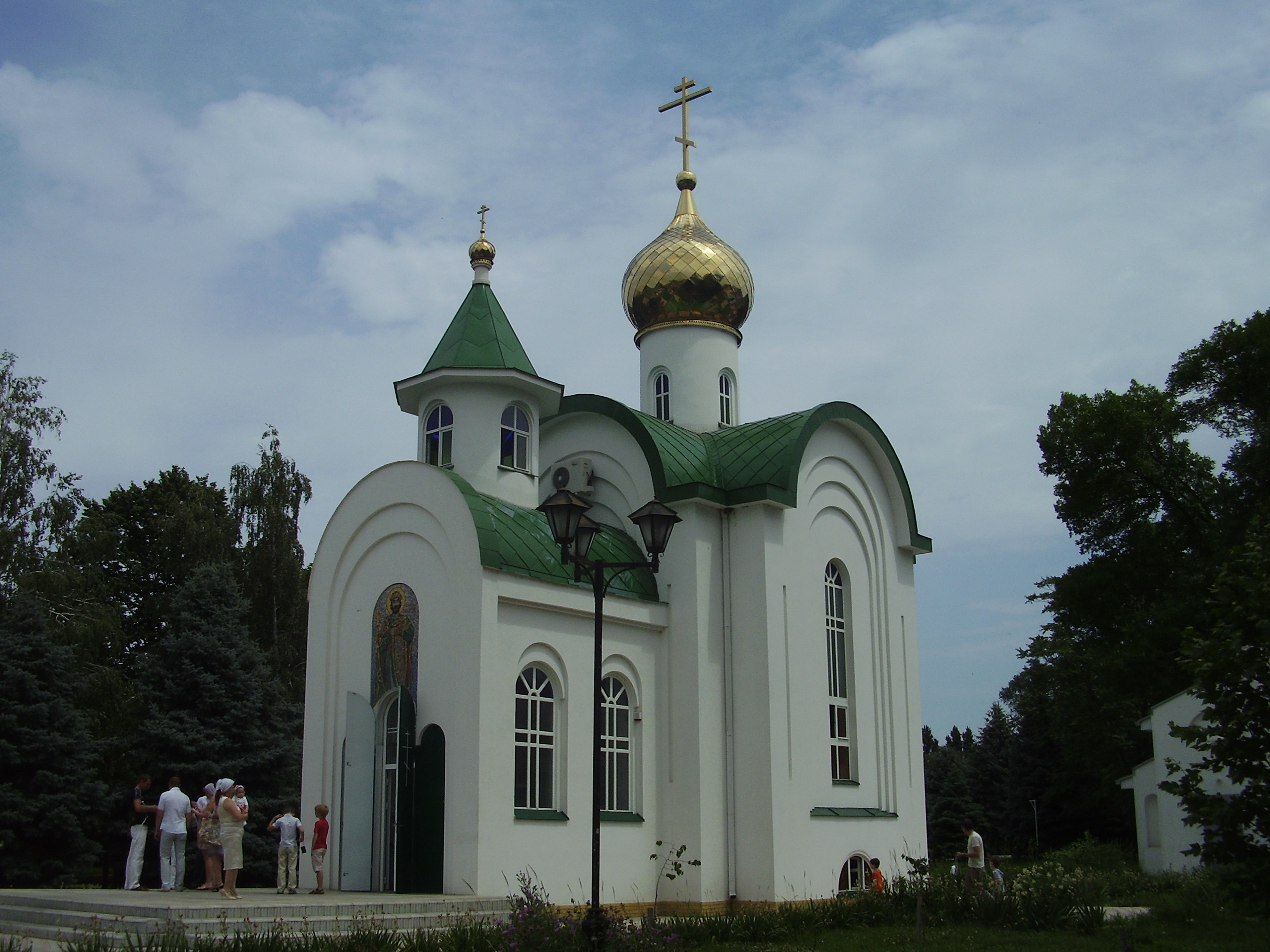 город Тимашёвск. Церковь в парке.